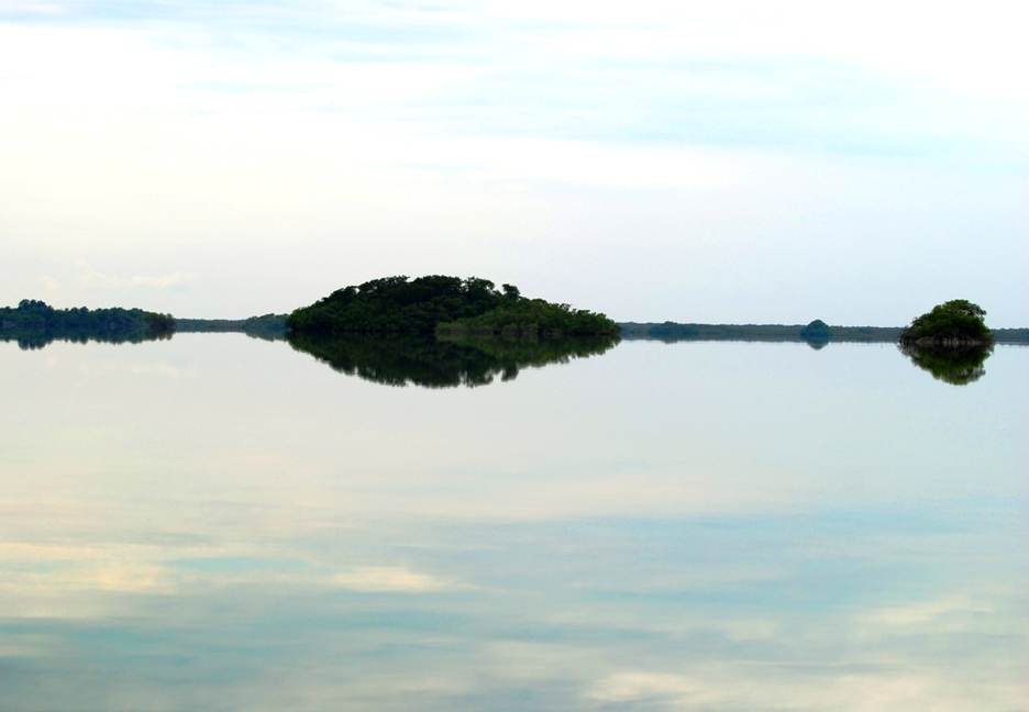 Shipstern Lagune in Belize